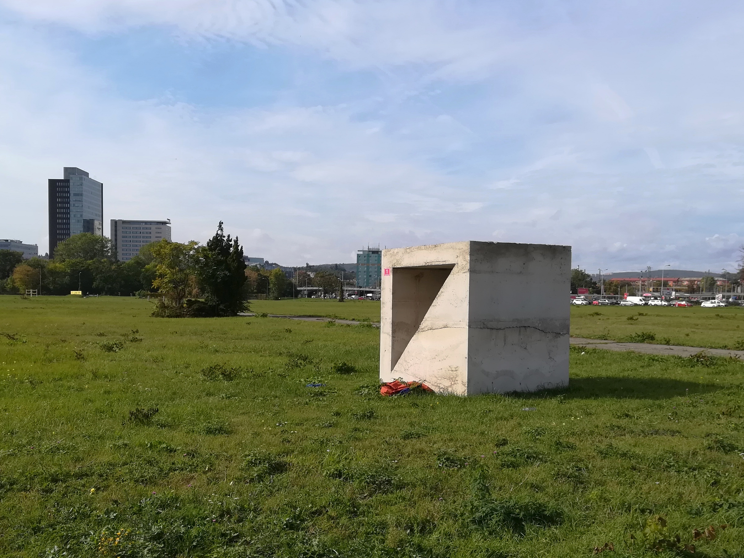 Brno-Trnitá, ul. Opuštěná, instalace Tvárnice, Martin Zet